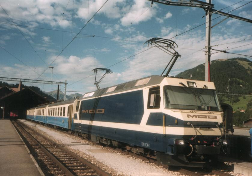 Ein Zug der Montreux–Berner Oberland-Bahn (MOB) mit einer Ge 4/4 in Zweisimmen.